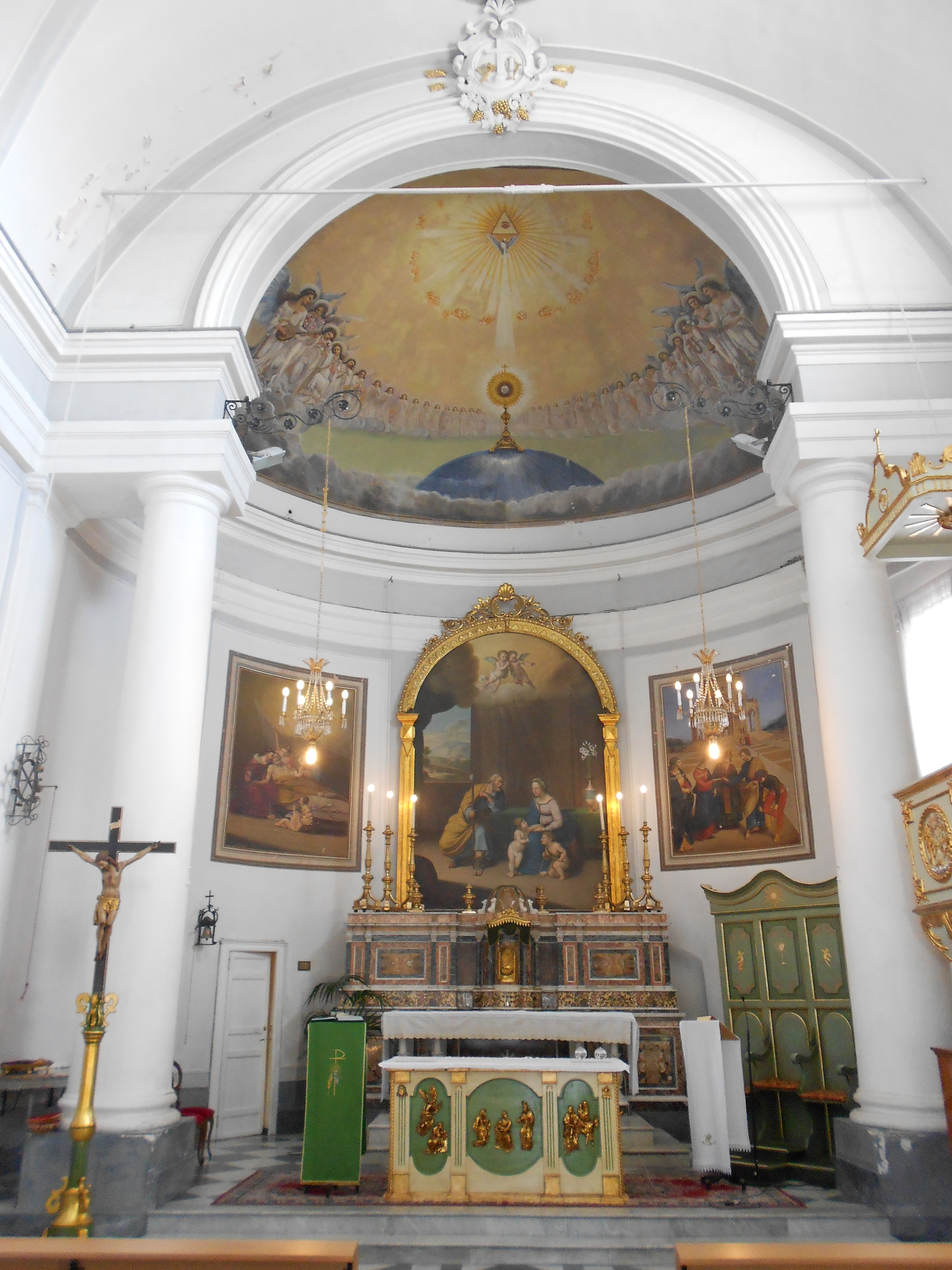 Altare Maggiore della Chiesa Madre